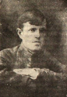 Повстанський отаман Тесленко 1918